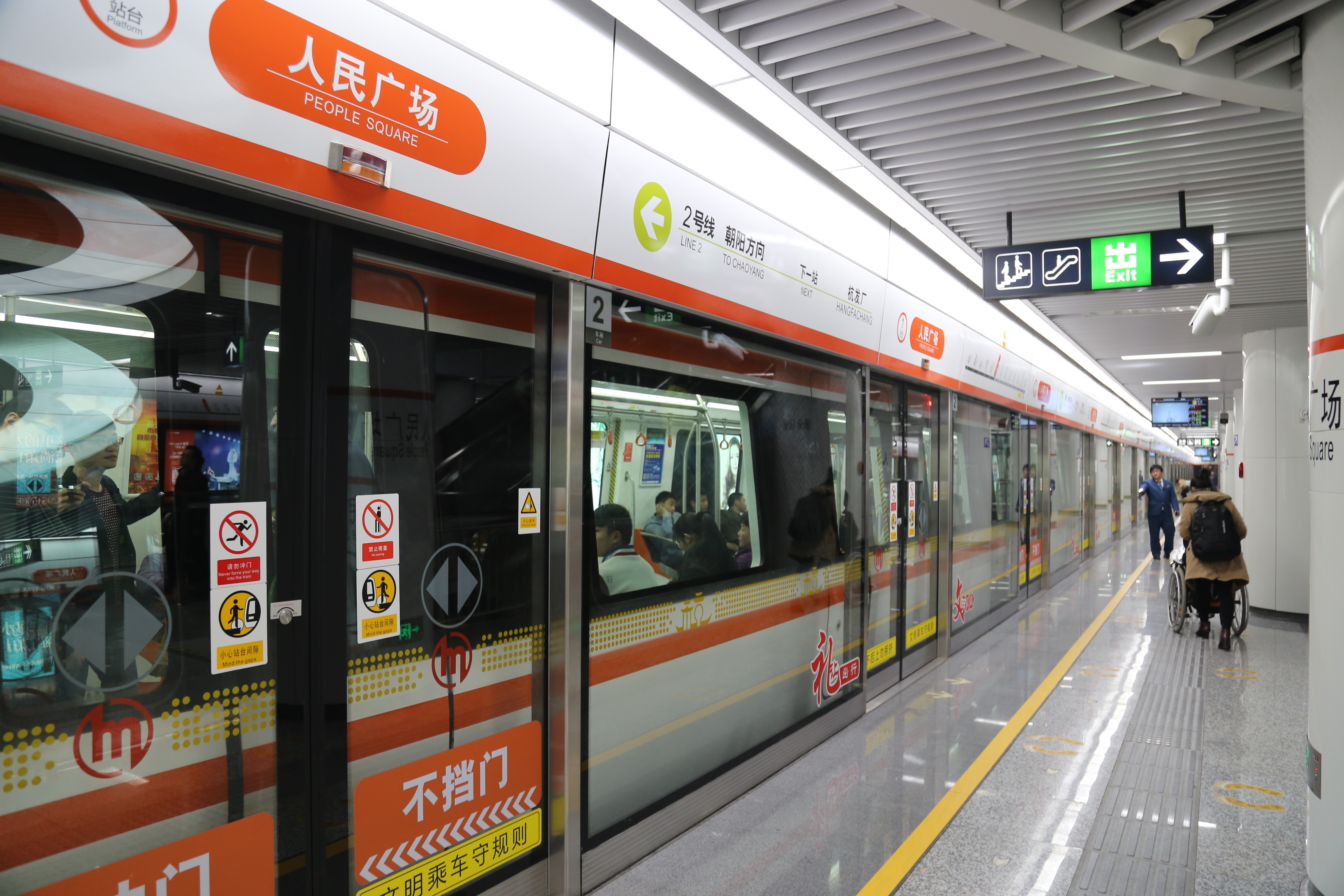 杭州地铁2号线人民广场站台